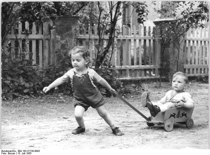 Groß-Germersleben, Erntekinderkrippe der LPG Zentralbild Biscan 15.7.1955 Ernte-Kinderkrippe nimmt Bäuerinnen und Landarbeiterinnen die Arbeit ab. Neben dem schon seit Jahren in Groß-Germersleben, Kreis Wanzleben, bestehenden Kindergarten wurde für die Sommer- und Herbstmonate noch eine Ernte-Kinderkrippe eingerichtet, in der Kleinkinder bis zu drei Jahren Aufnahme finden. Die Mütter können so unbeschwert und frei von Sorgen an der Einbringung der Ernte teilnehmen. UBz: In der Ernte-Kinderkrippe: Peter Herbing (Sohn des Agrnomoms des Volksgutes) hat sich in ein Wägelchen gesetzt und Horst Brauer (Sohn eines Genossenschaftsbauern der LPG "Bördeland") zieht ihn munter durch den Garten.